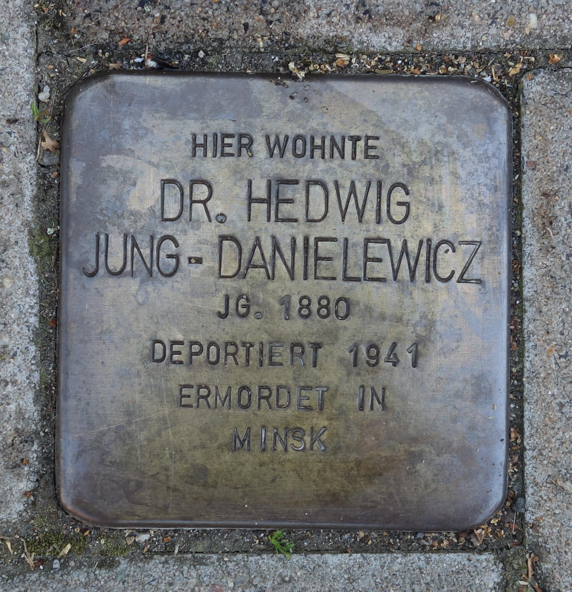 Stolperstein Dr. Hedwig Jung-Danielewicz, Düsseldorf, vormals Uhlandstraße 23, heute Uhlandstraße 21/Ecke Schumannstraße 25. Vorgänger-Stein, gelegt Oktober 2007